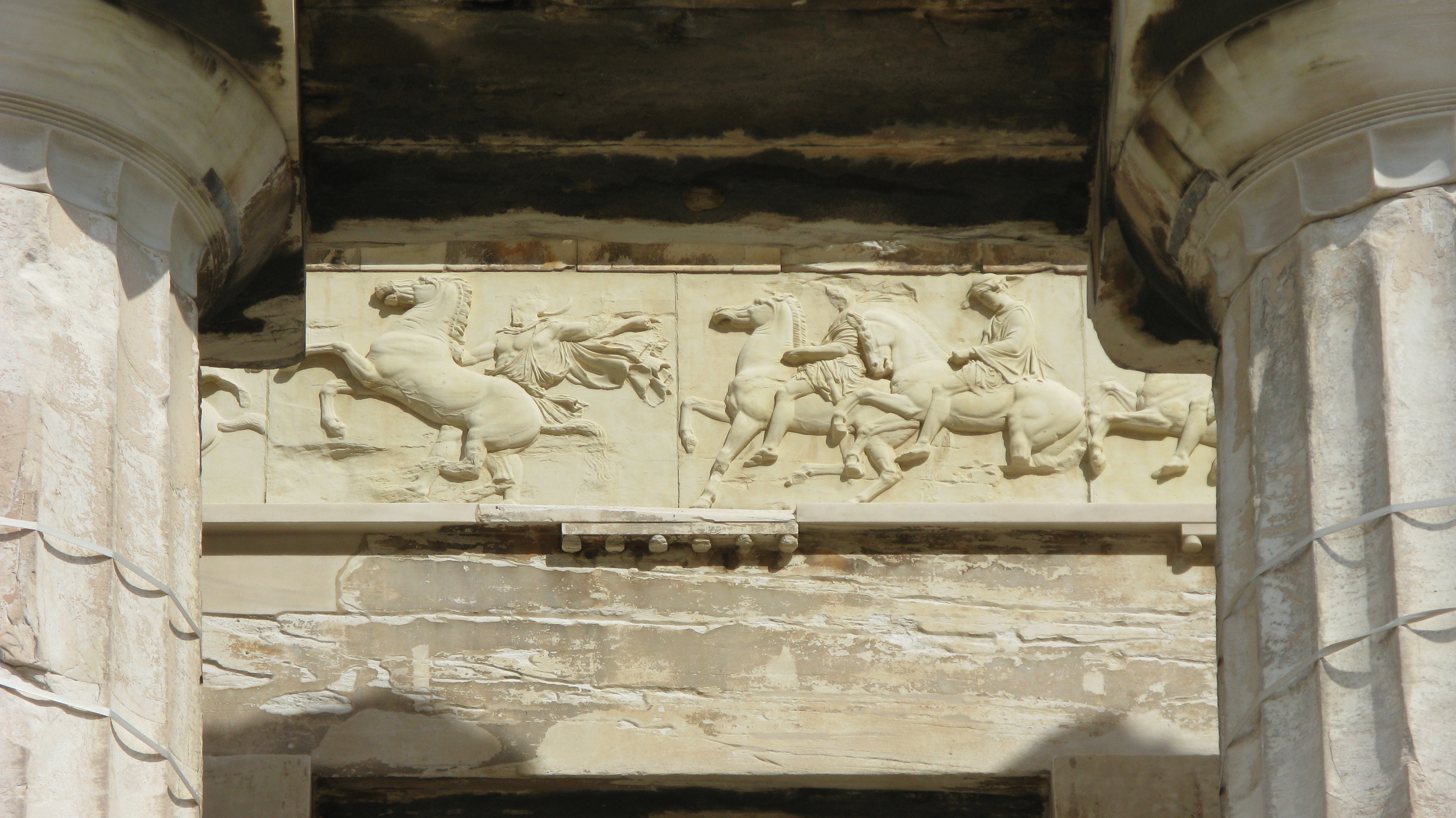 Acropolis of Athens, Greece. --- Παρθενώνας. Ακρόπολη, Αθήνα.